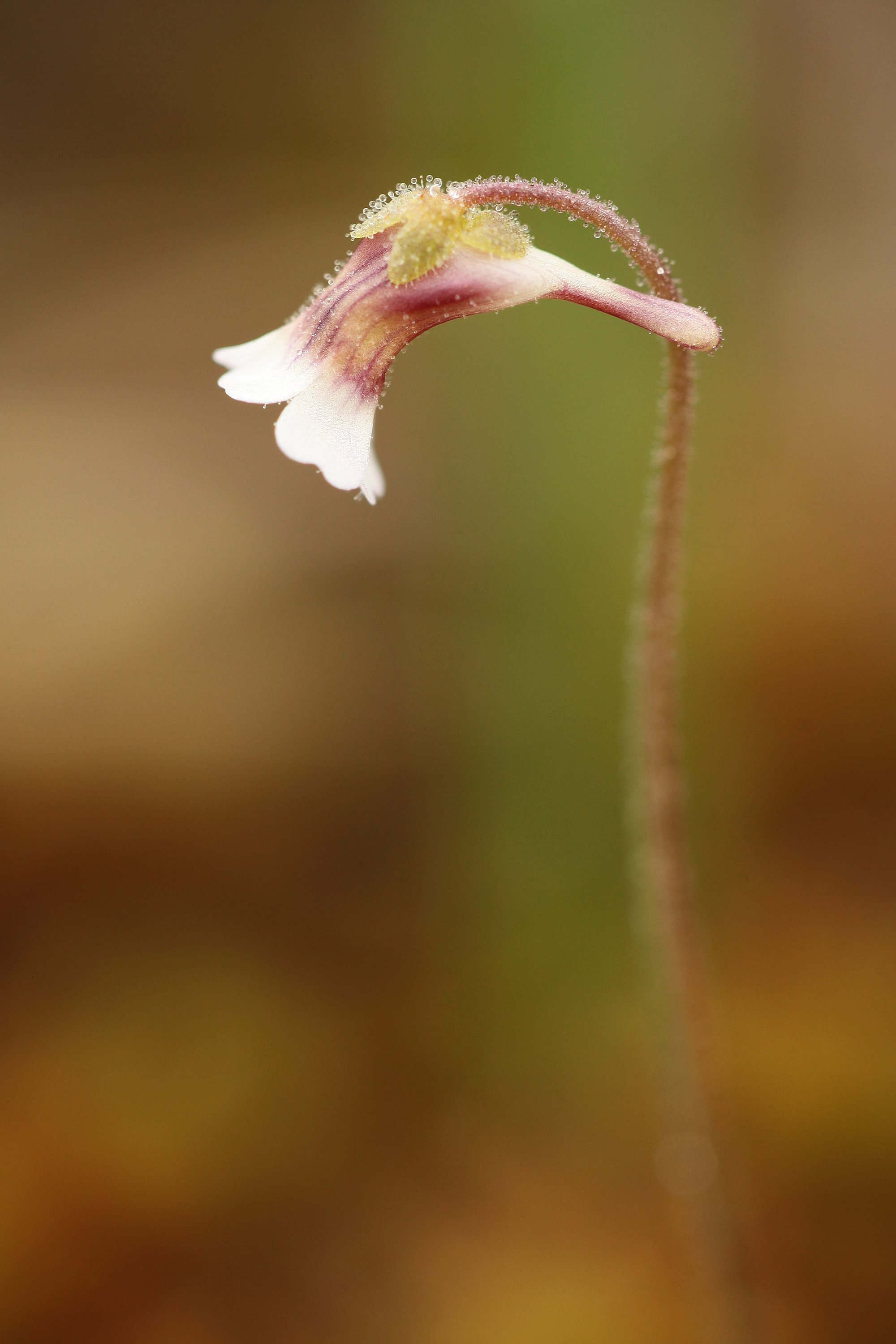 Pinguicula lusitanica, Hostens, France